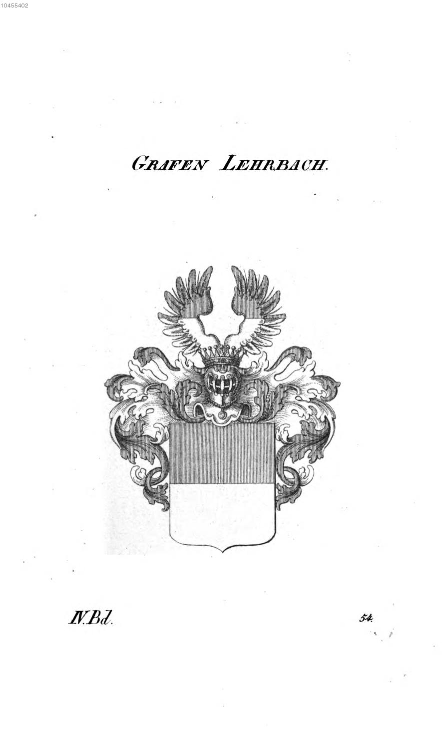 Wappen Lehrbach - Tyroff AT.jpg